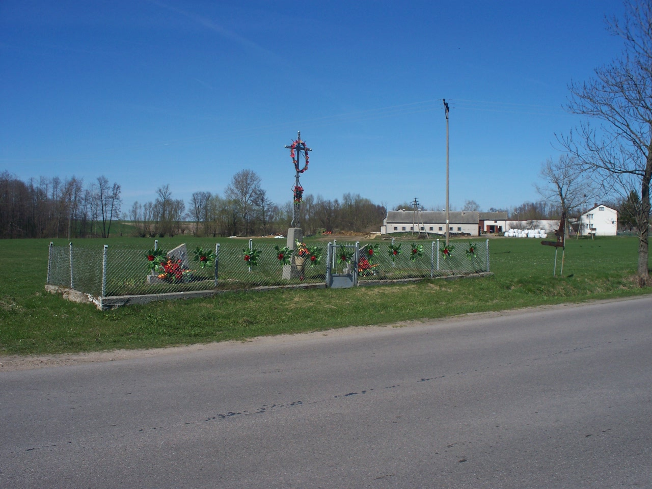 Na mogile tej znajduje się krzyż metalowy na cokole betonowym oraz dwie tablice z lastryka. Teren jest ogrodzony metalową siatką